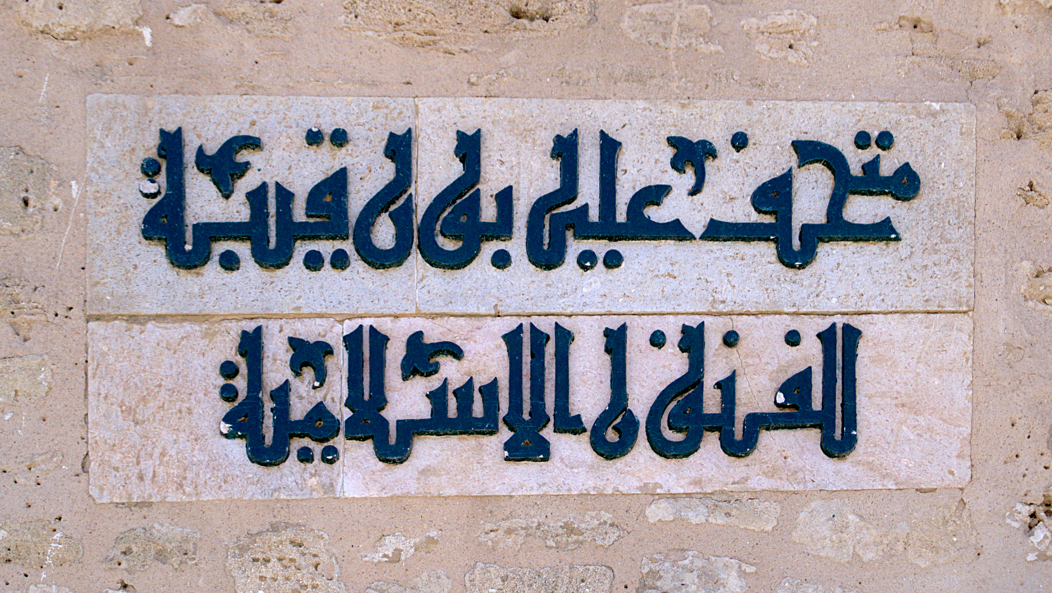 Kasba, Monastir